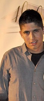 Ramiro Peña